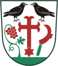 Havraníky znak